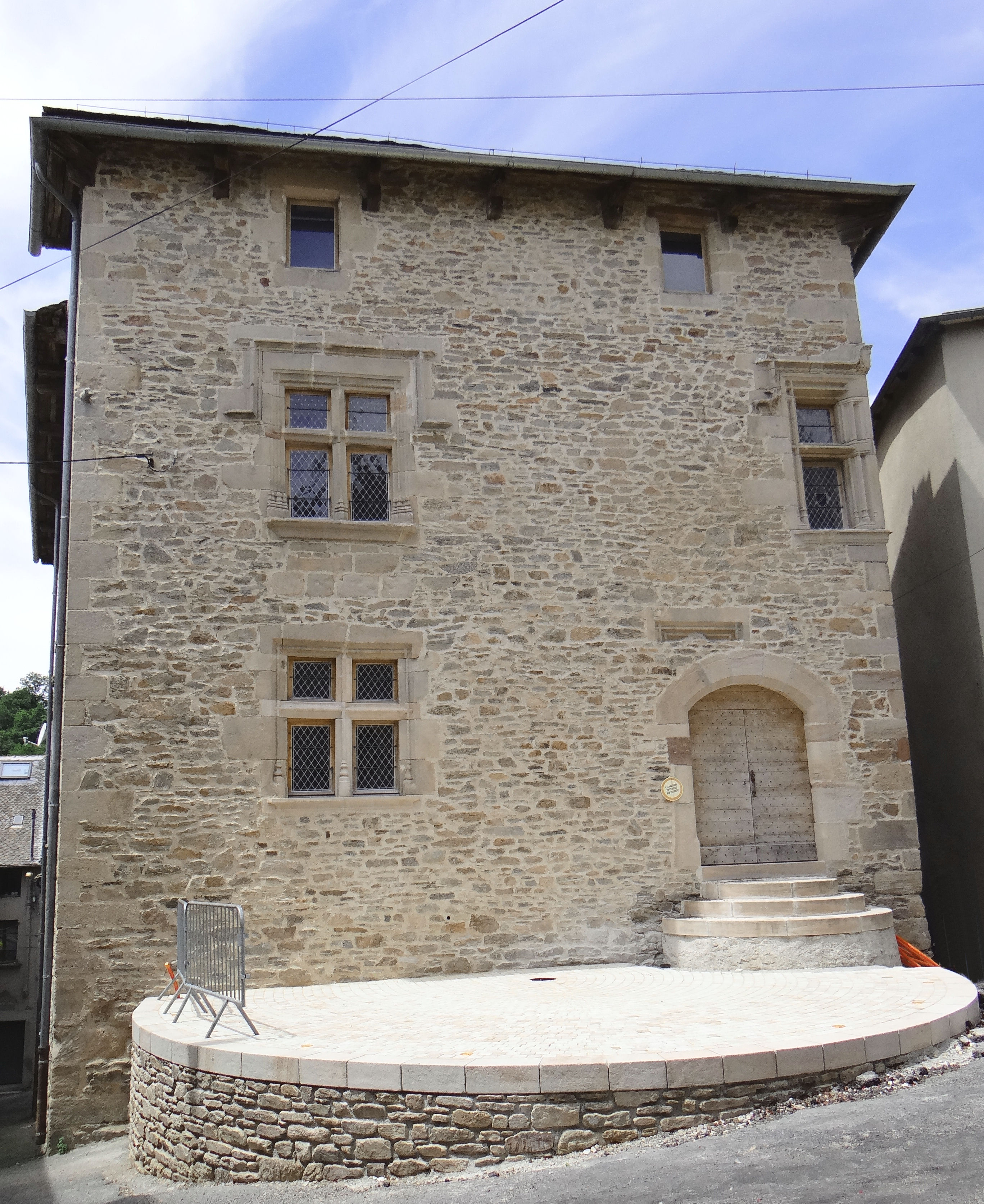 Salles-Curan - Grenier-des-Évêques sur la place de l'église .